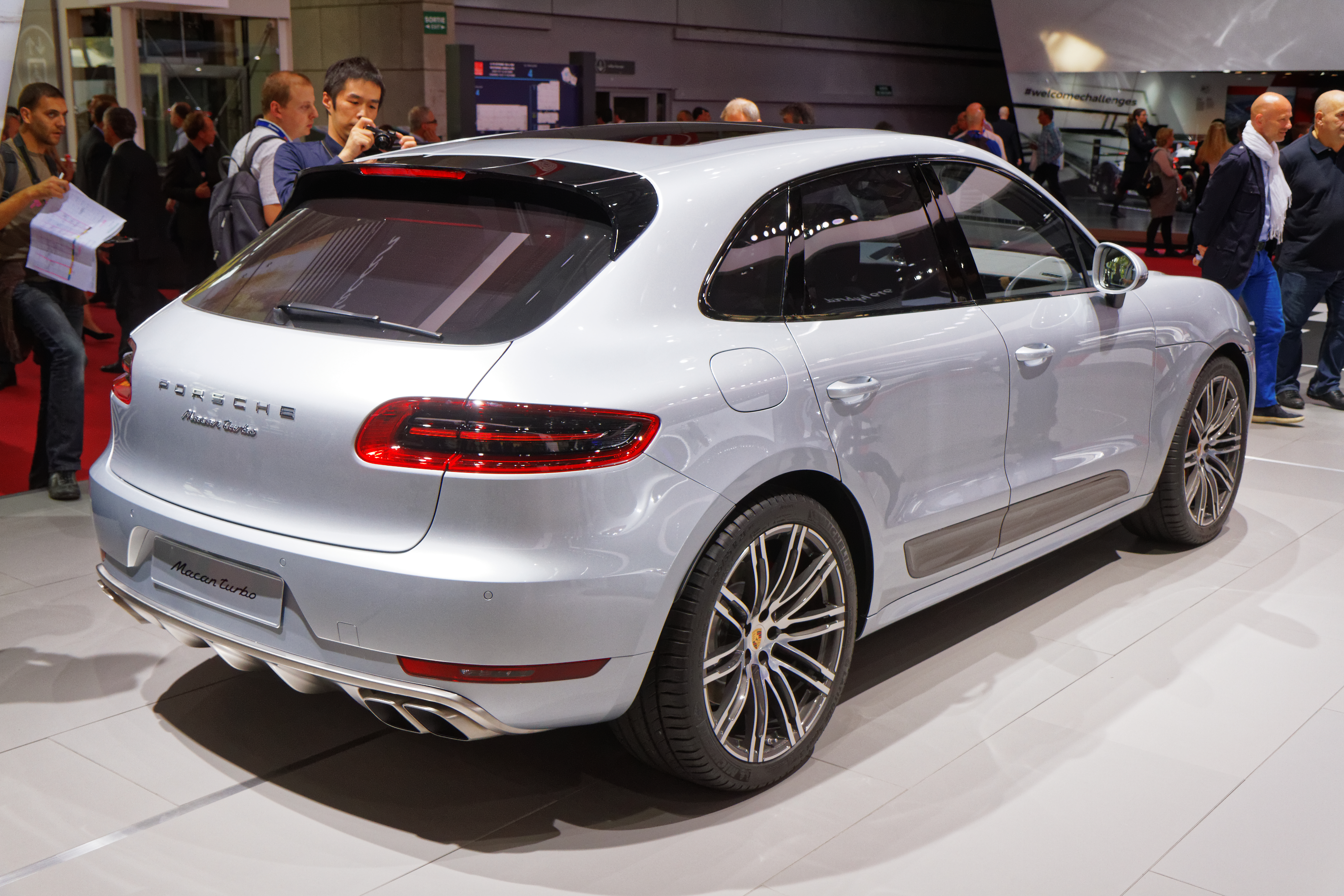 Une Porsche Macan turbo présentée lors du mondial de l'automobile de Paris 2014.